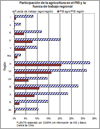 Agricultura por regiones y empleos y aporte al pib